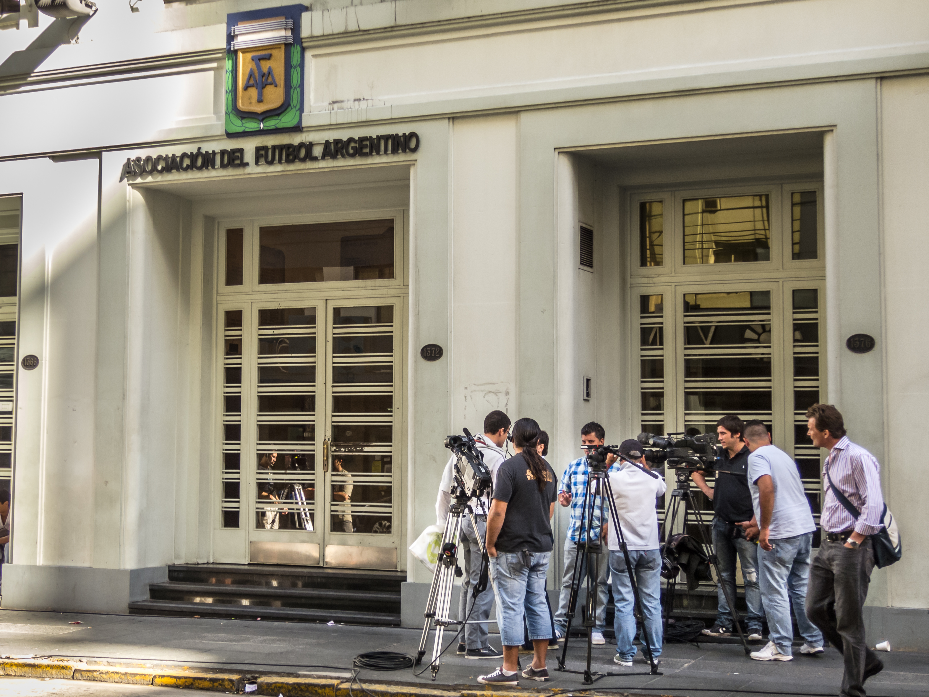 Medios de prensa en la puerta de la sede de la Asociación del Fútbol Argentino (AFA). Buenos Aires.